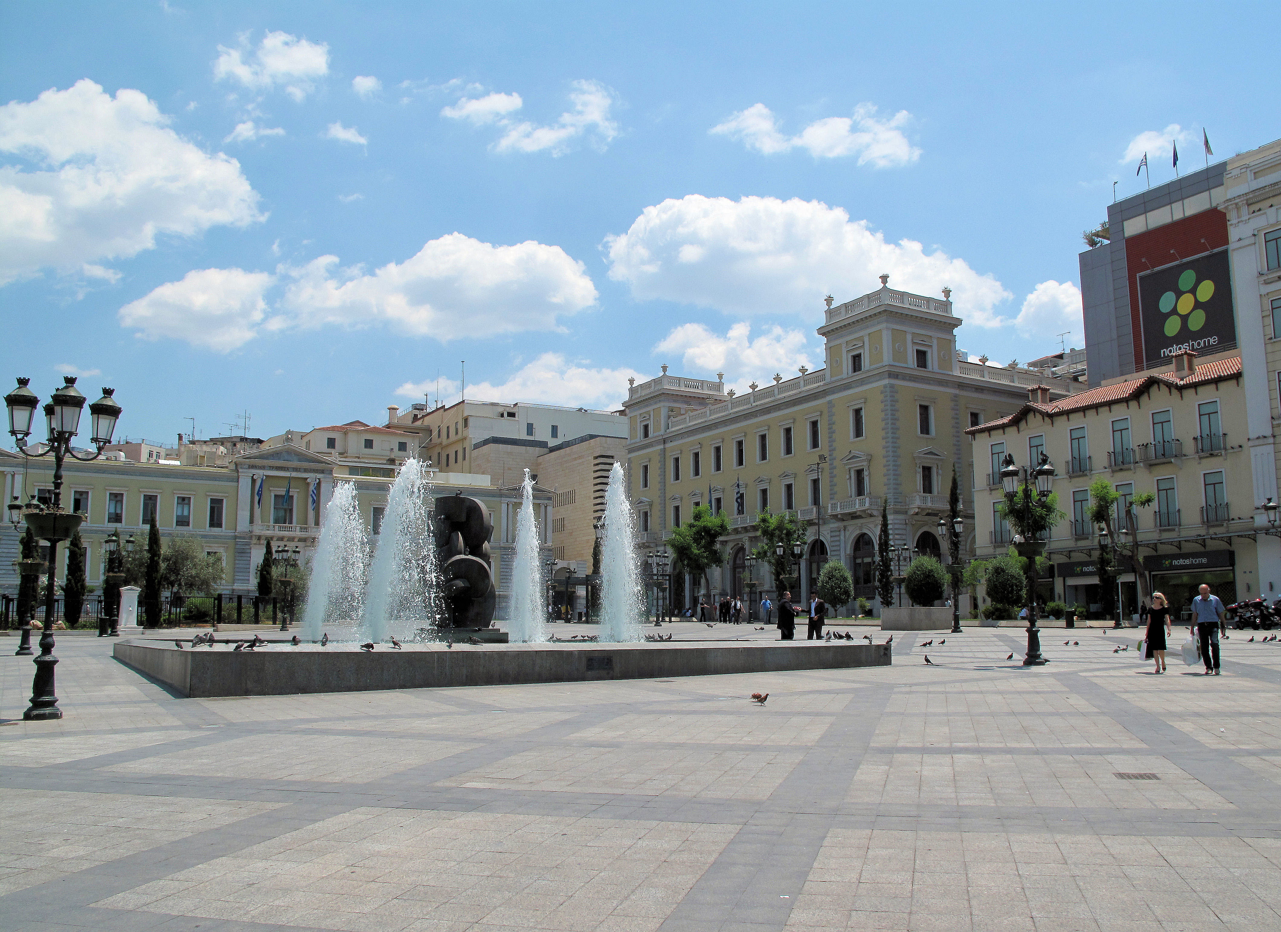 Plateia Kotzia